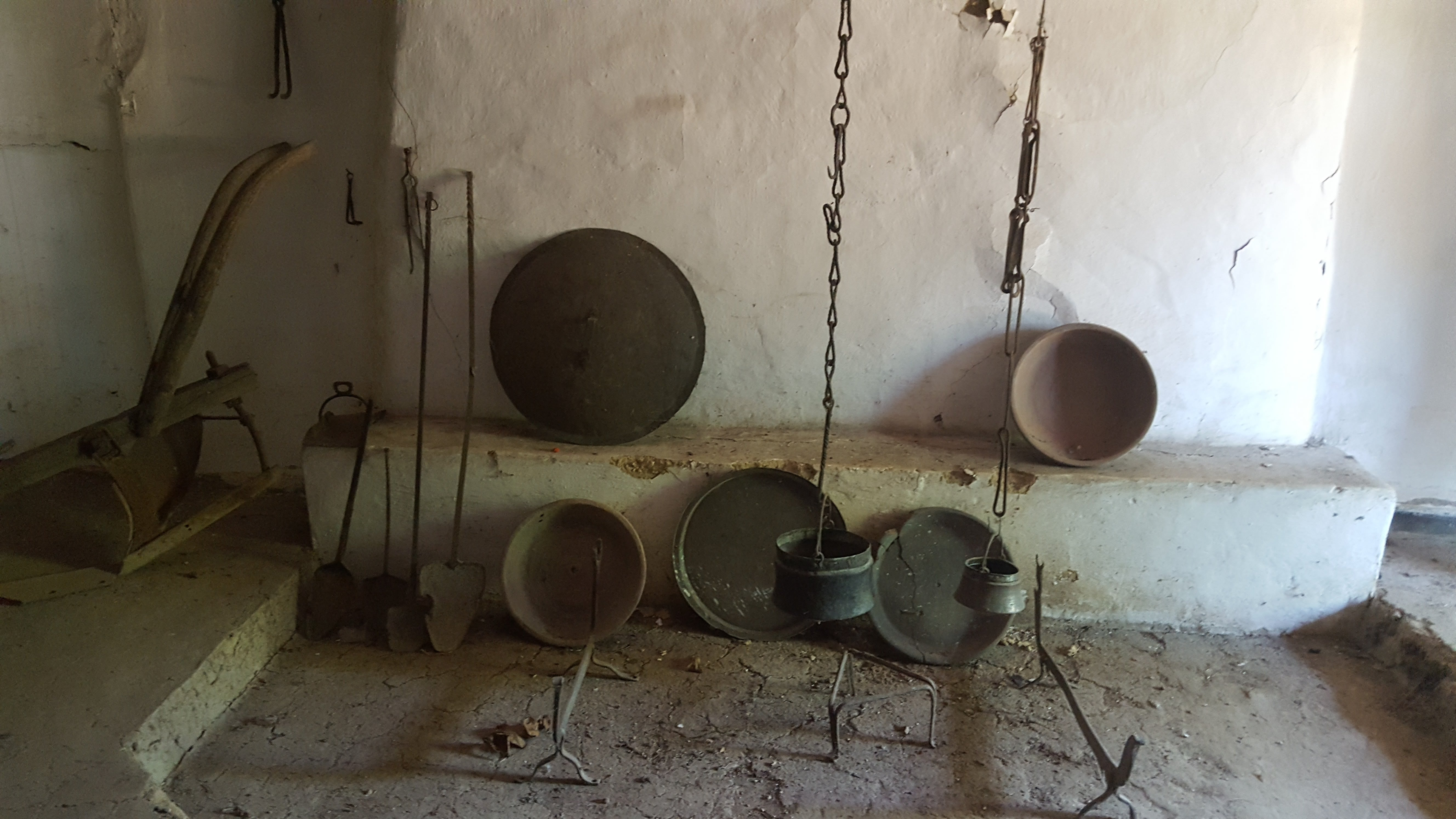 Odžaklija Matića kuće u Vraniću